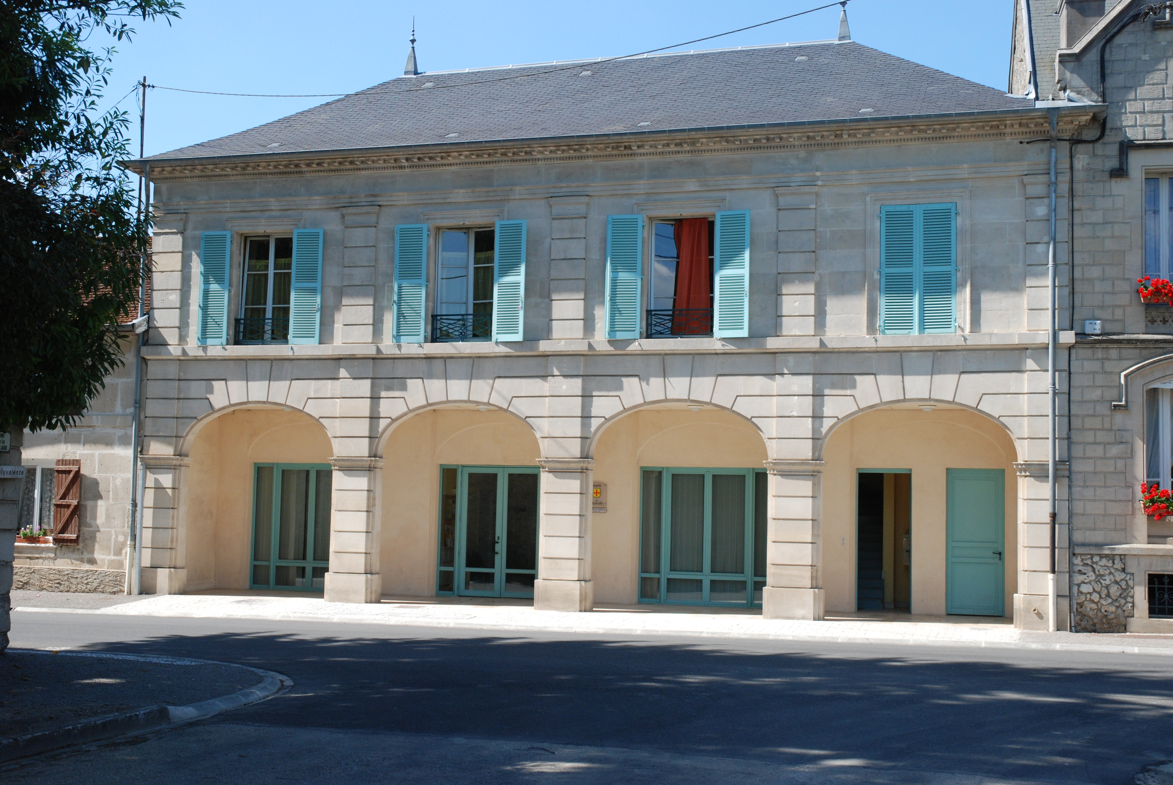 Bâtiment de la Mairie de Stainville restauré. L'ancienne salle de mairie était à l'étage. Deux logements communaux y ont été installés et la mairie est maintenant située au rez-de-chaussée ainsi qu'une agence postale communale